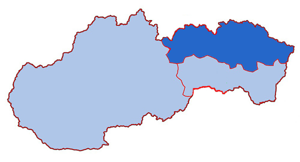 Mappa dell'arcieparchia greco-cattolica di Presov, in Slovacchia. Lavoro personale.